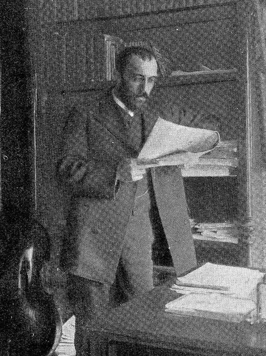 Leandro Pita Sánchez-Boado, fotografía en Vida Gallega 1910